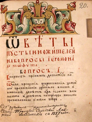 Manuscript from the official website of Trinity-Sergius Lavra, the monument of the Old Believers